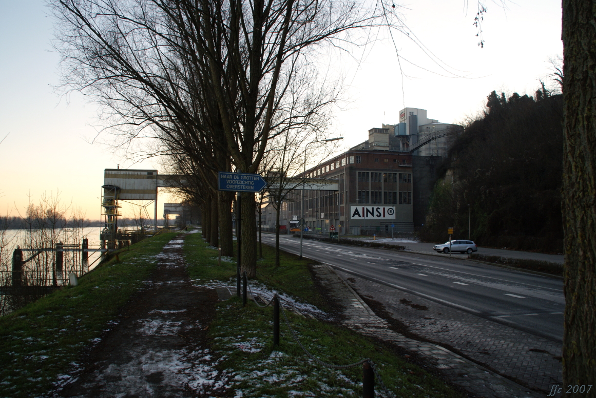 Cultuurfabriek AINSI, voorheen onderdeel van cementfabriek ENCI aan de Maas in Maastricht.